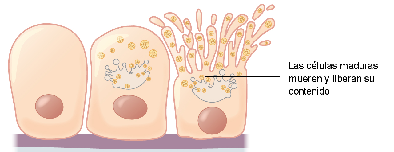 Esquema en el que se muestra el proceso de secreción en una glándula holocrina.